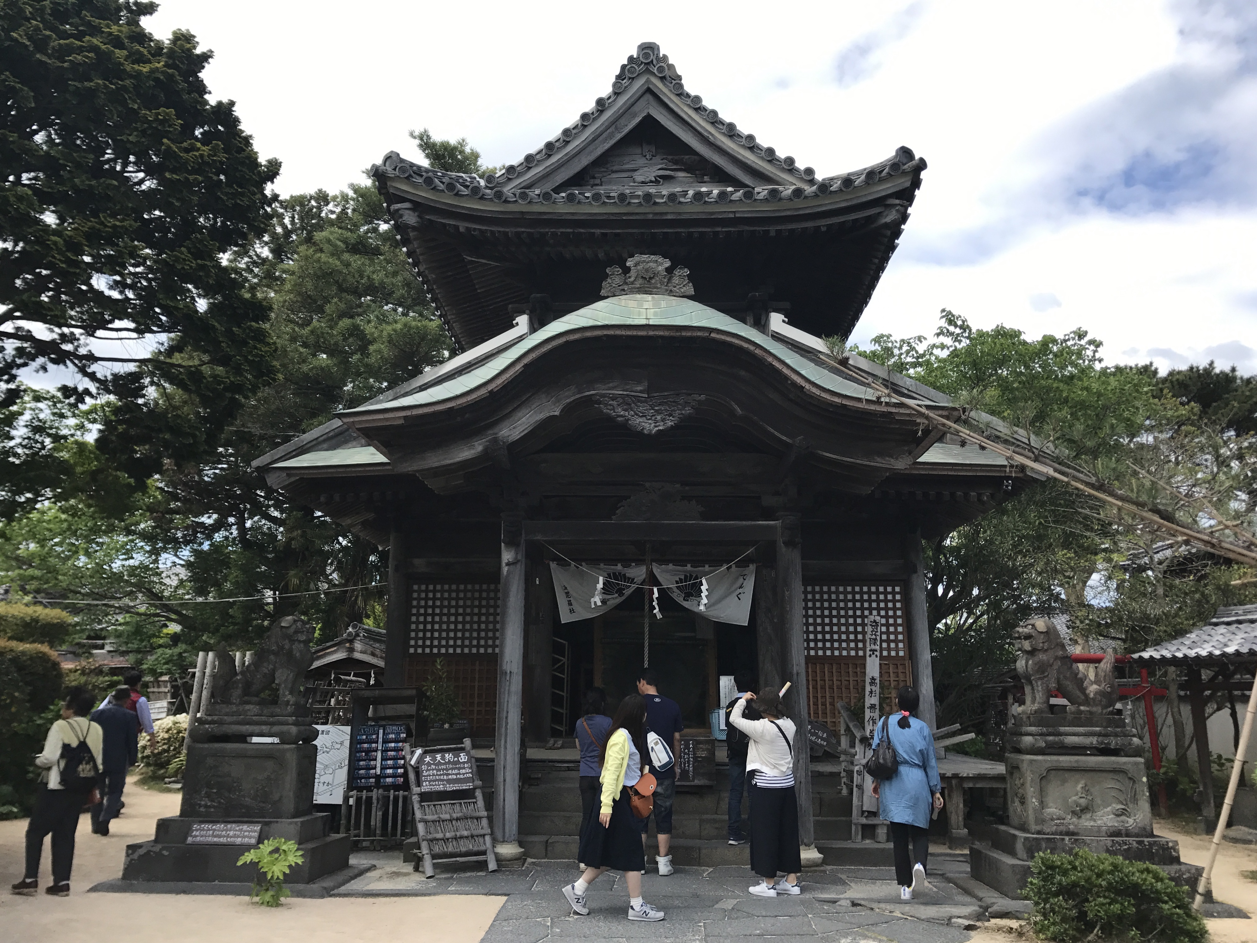 円政寺境内の金毘羅社